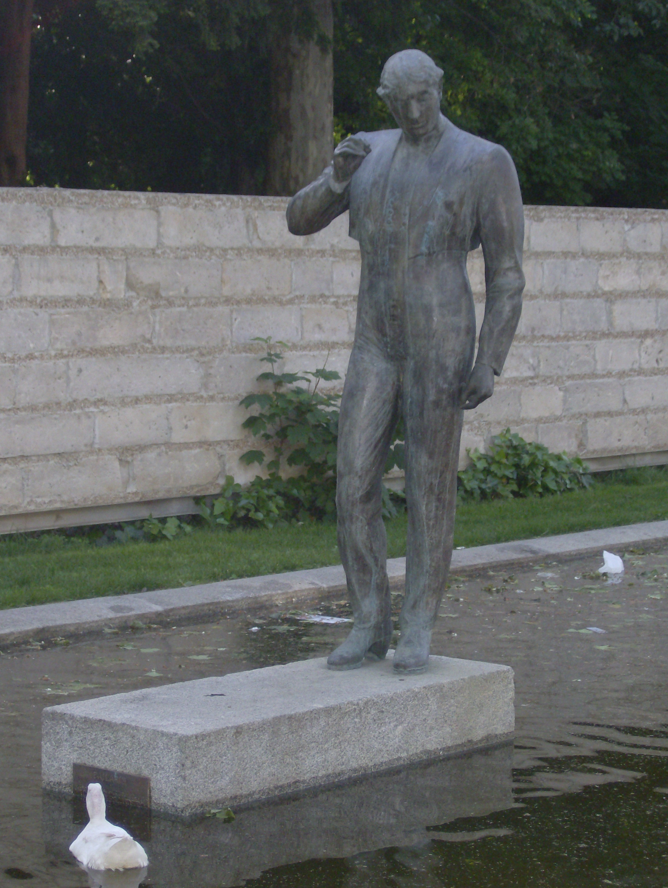 Baile en bronce (Belén González Díaz), homenaje a Vicente Escudero